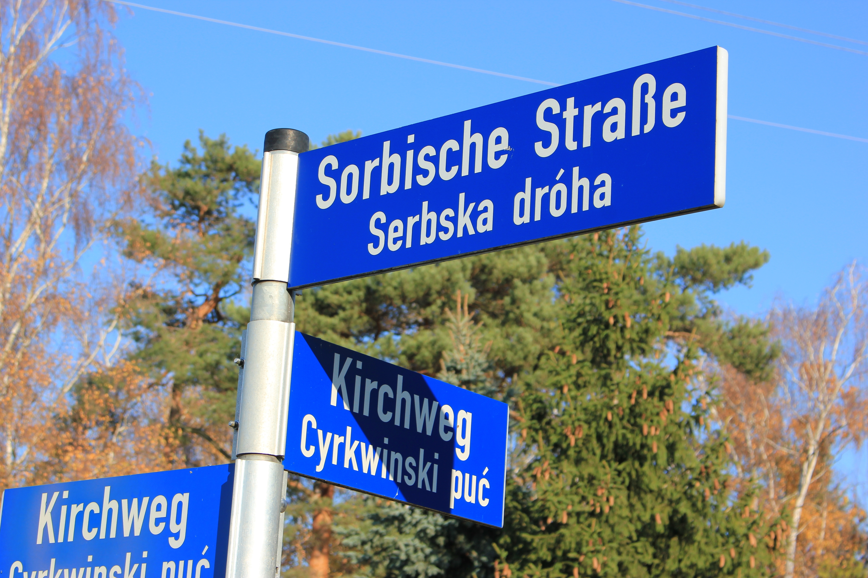 Hornjoserbsce: Značka při Serbskej dróze w Brěmjenju.